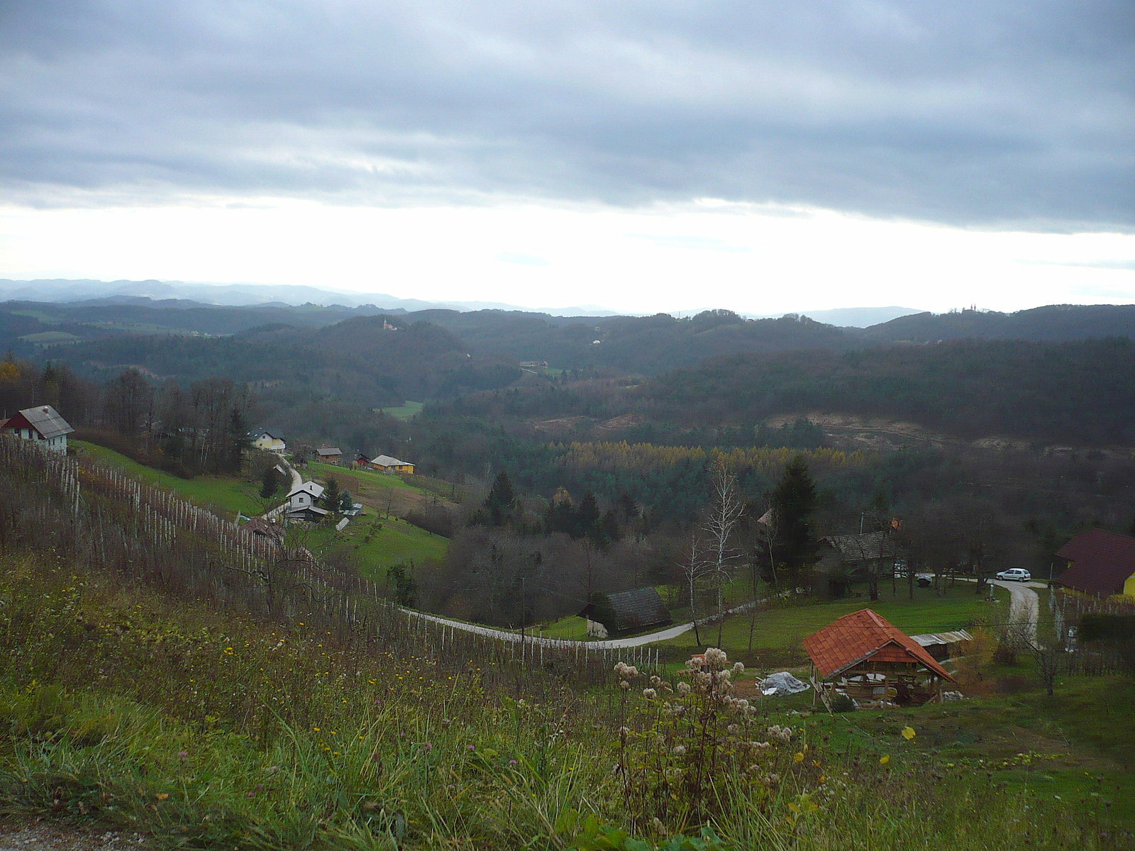 Levstikov pohod